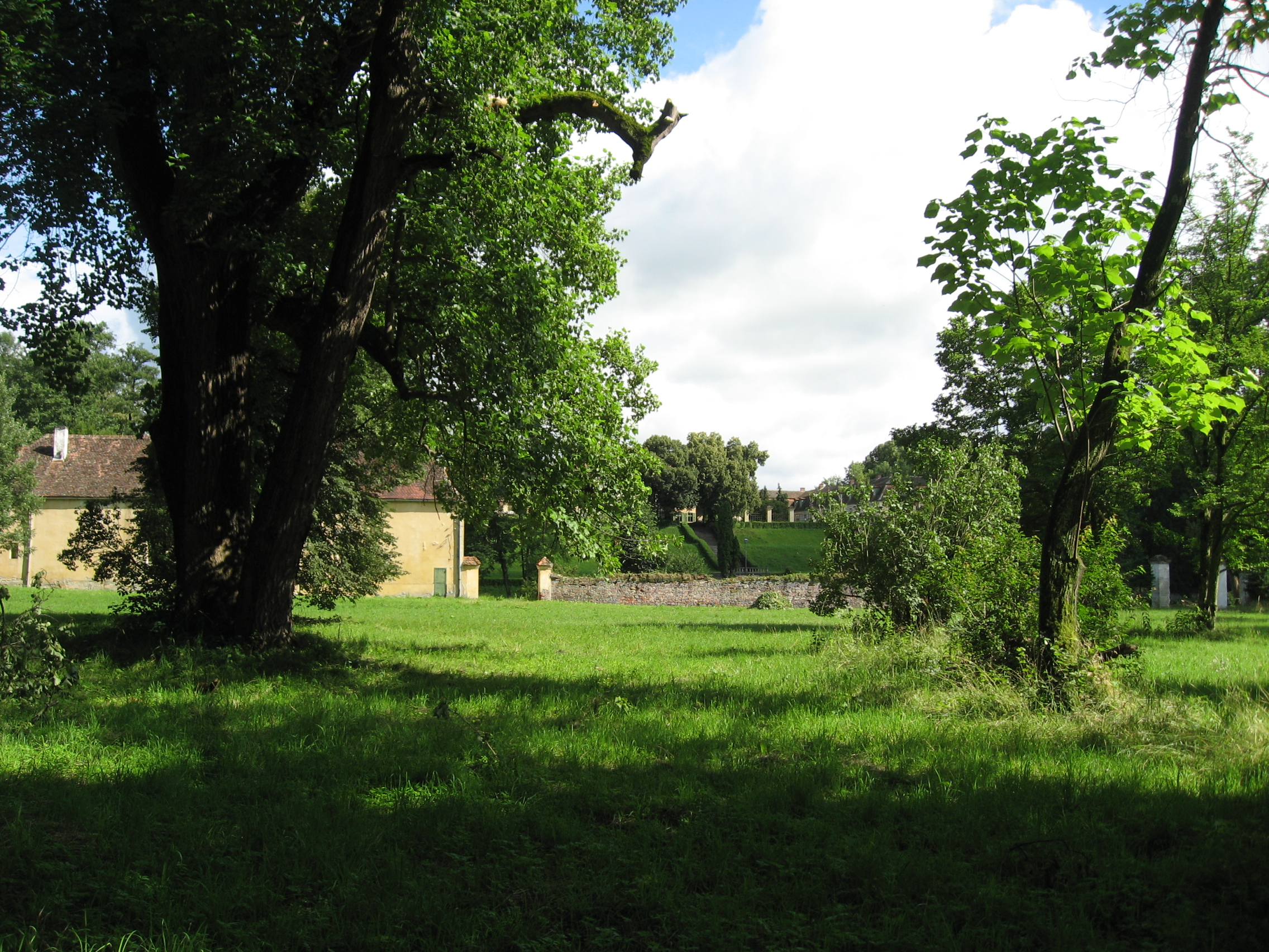 Brukenthal'sche Sommerresidenz in Freck / Avrig, Tulpenbaum im ehemaligen holländischen Garten, auf der Rückseite der Orangerie 01